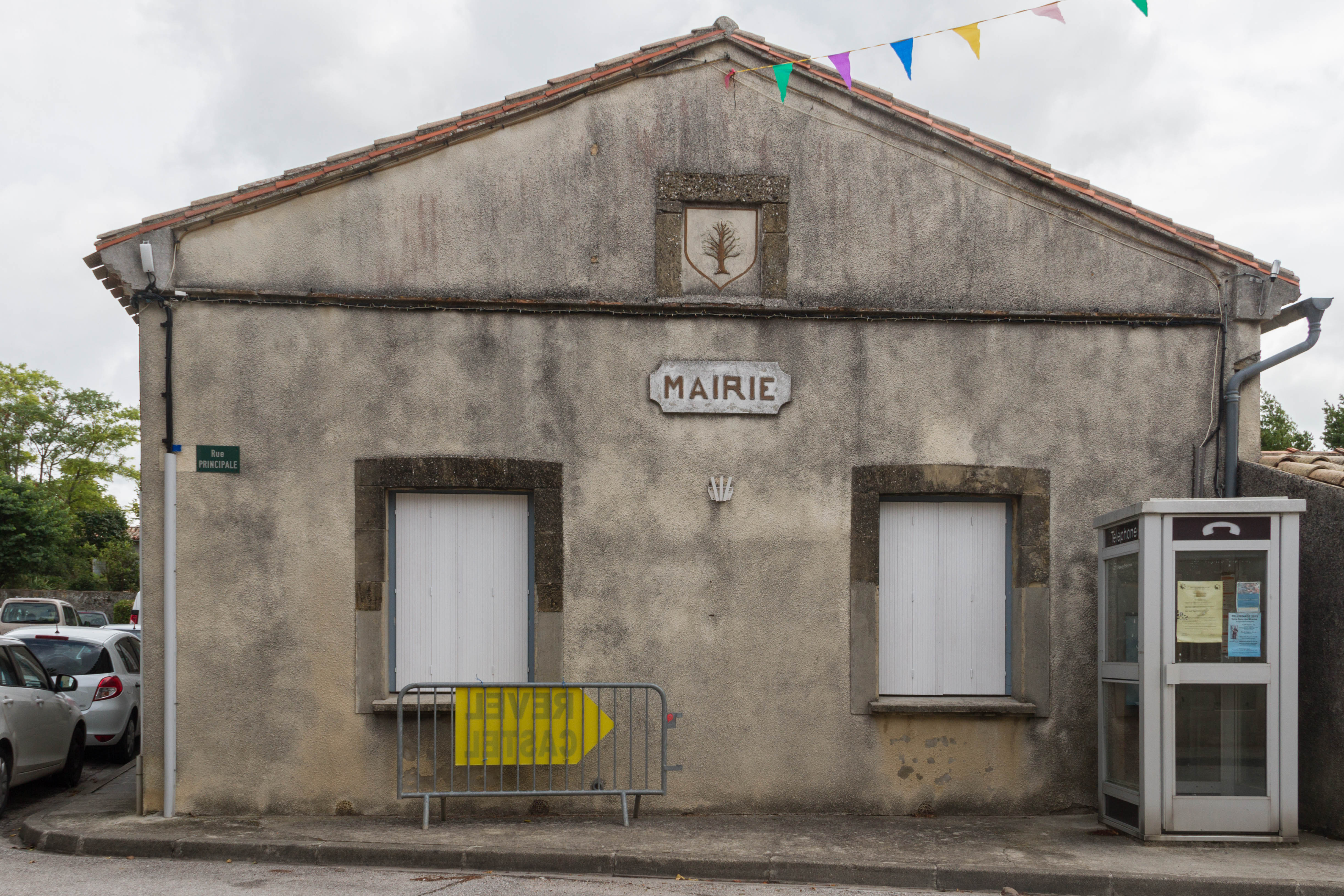 Les Cassés (Aude) - Mairie.